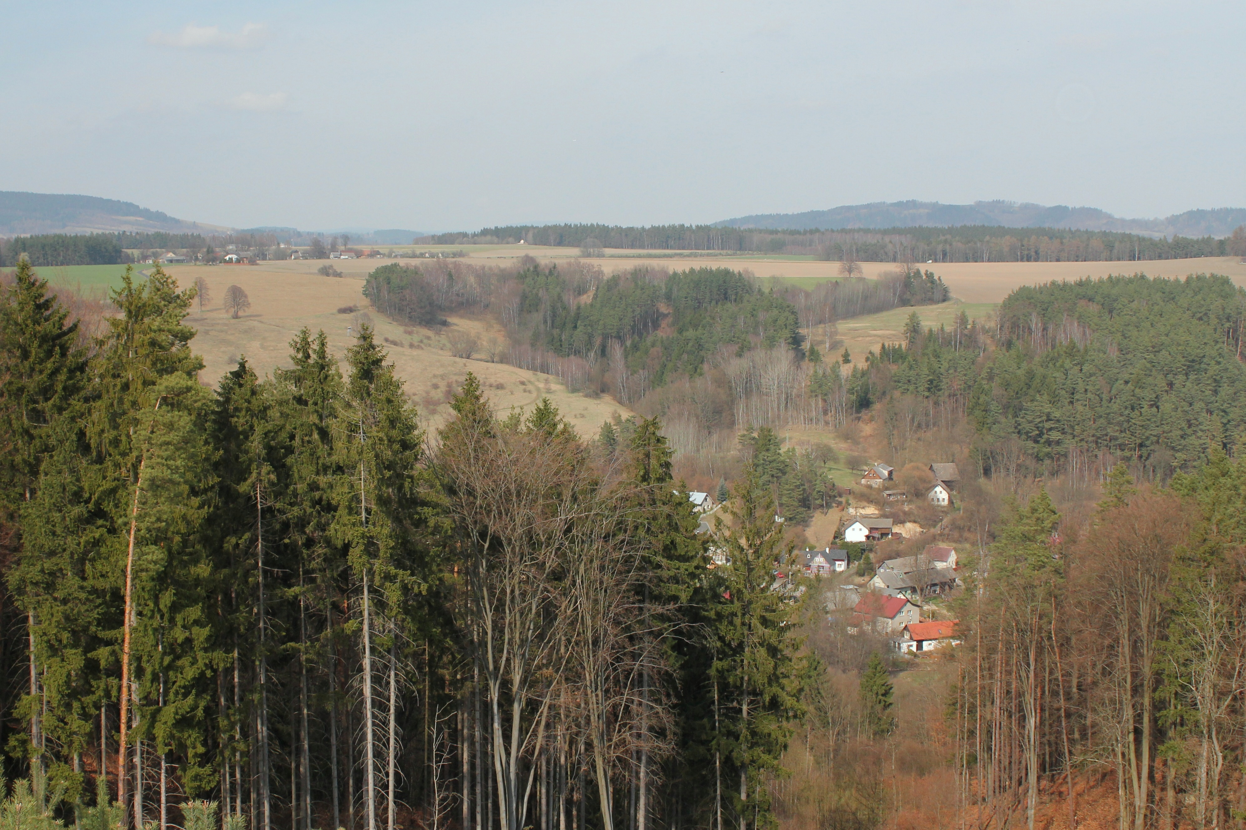 Osady Vrchovina a Třtí (obec Sychrov) od Jiviny (obec Vlastibořice)